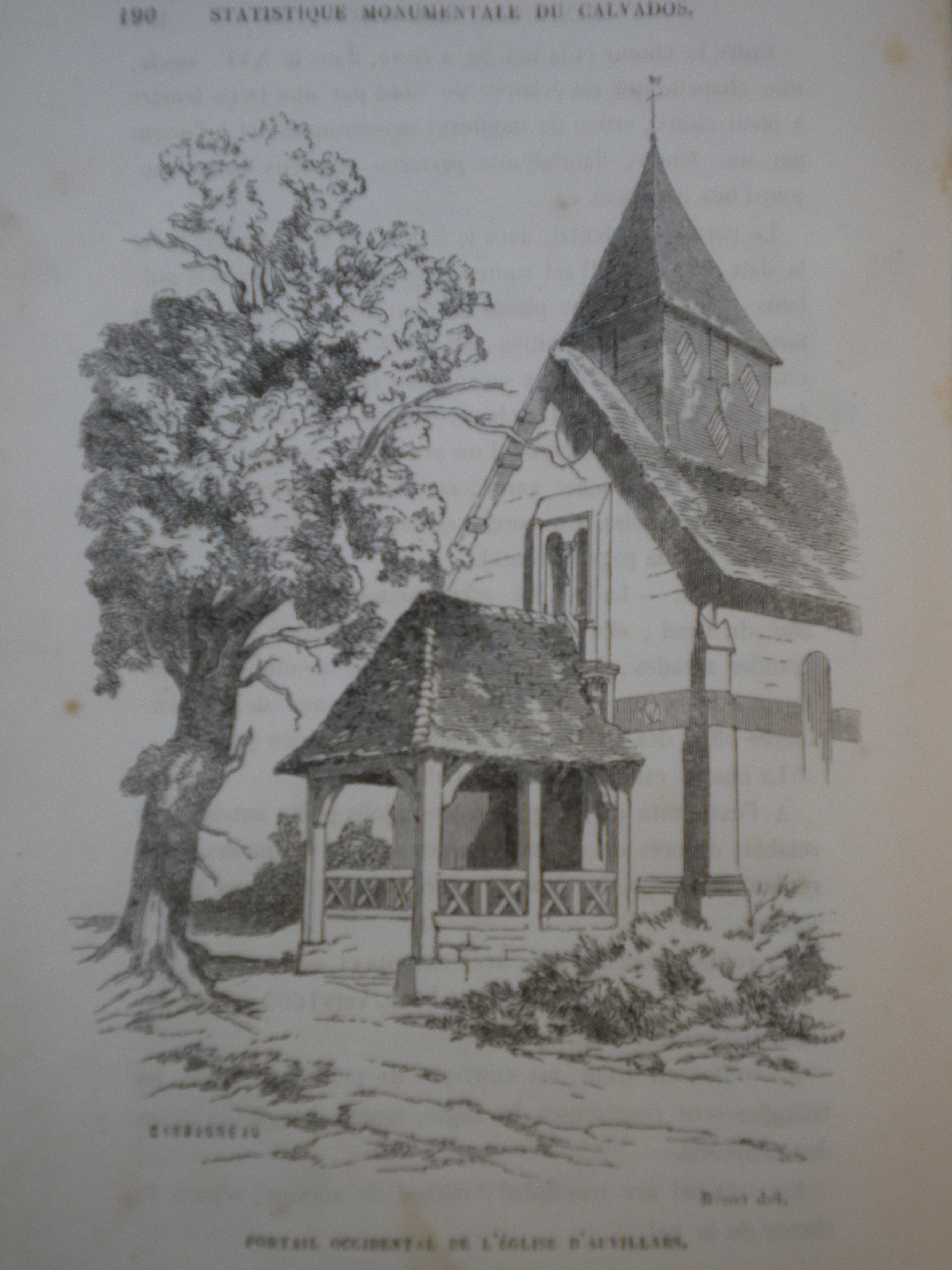 dessin du portail occidental de l'église d'Auvillars (France)